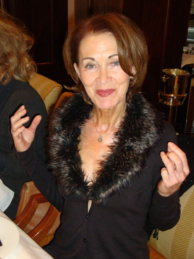 Annegrit Arens (2011)